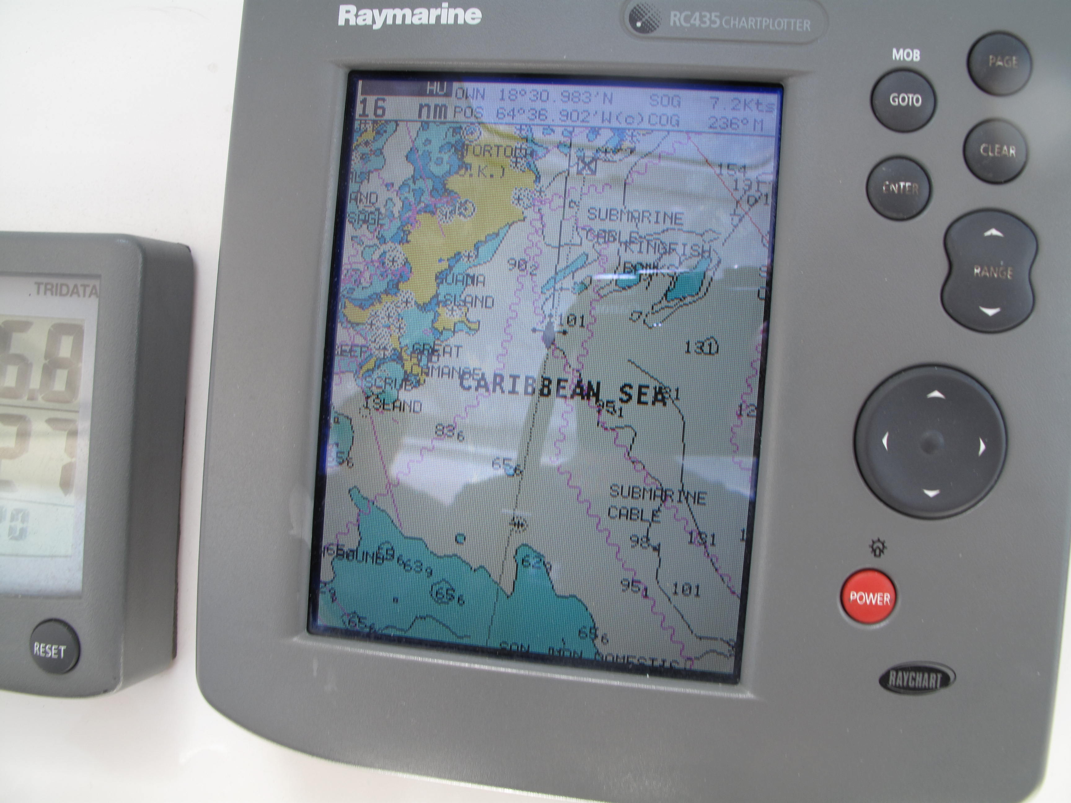 BVI 2009-273